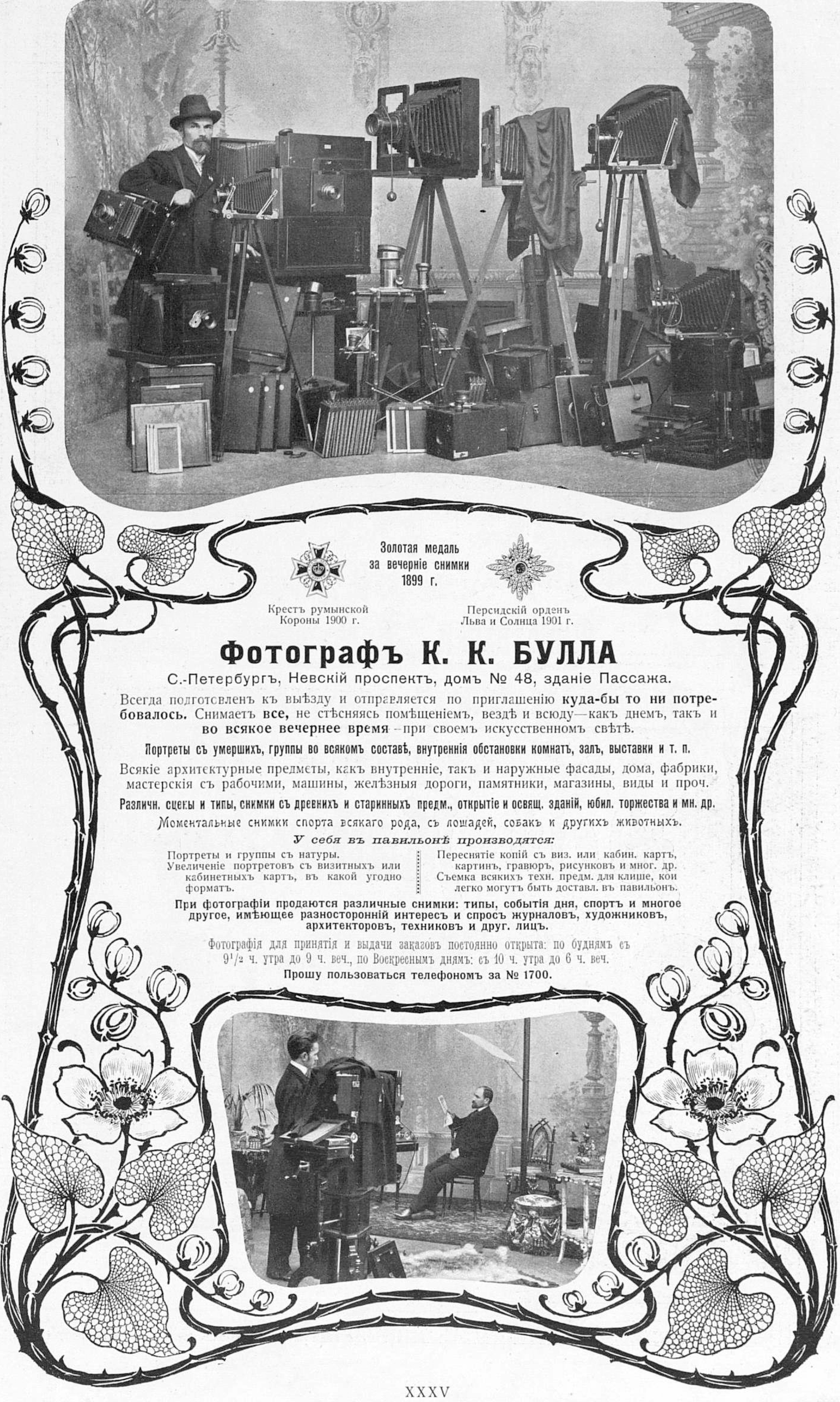 Реклама фотографа К. К. Буллы, 1902